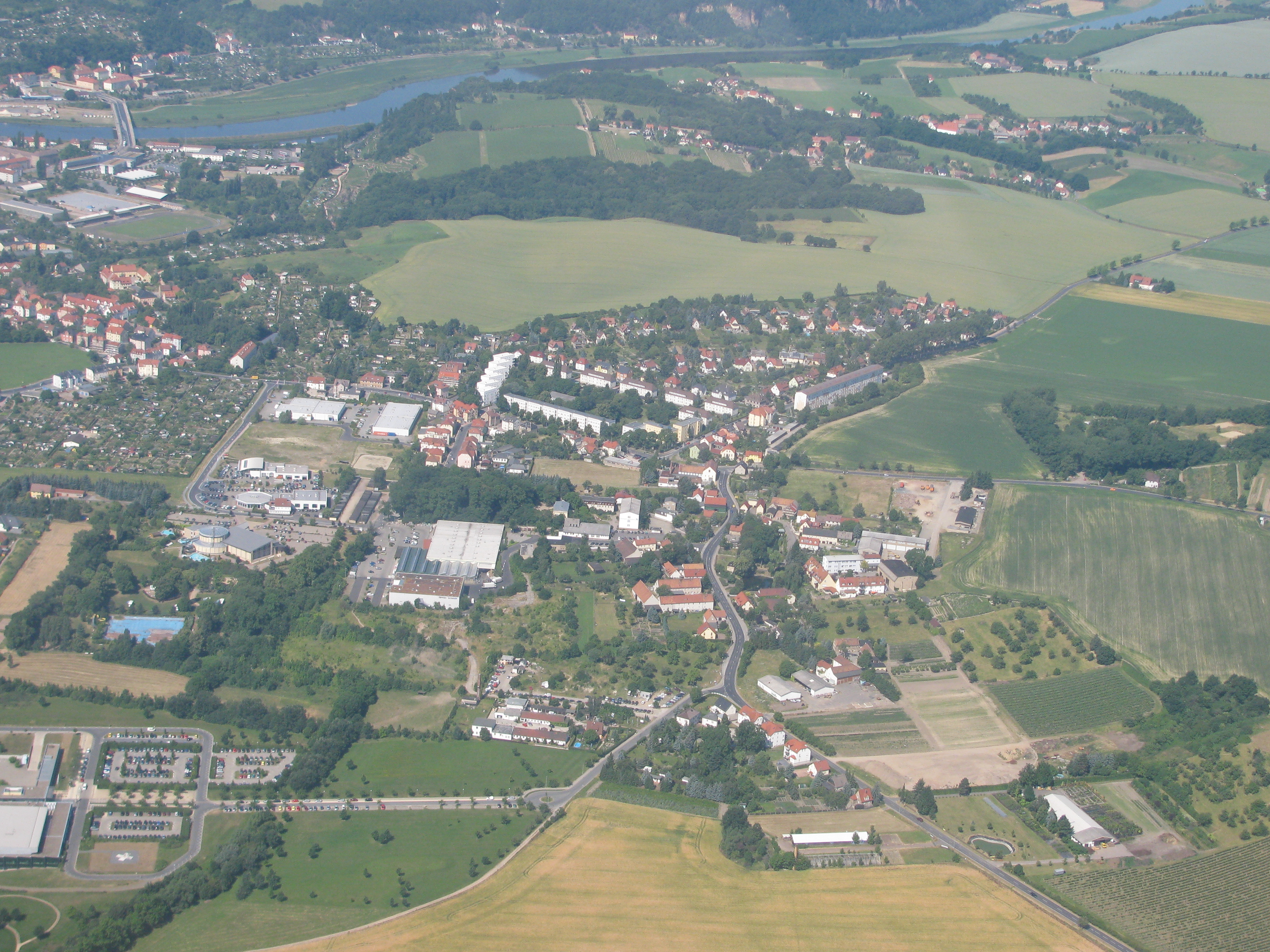 Luftbild Meißen-Bohnitzsch